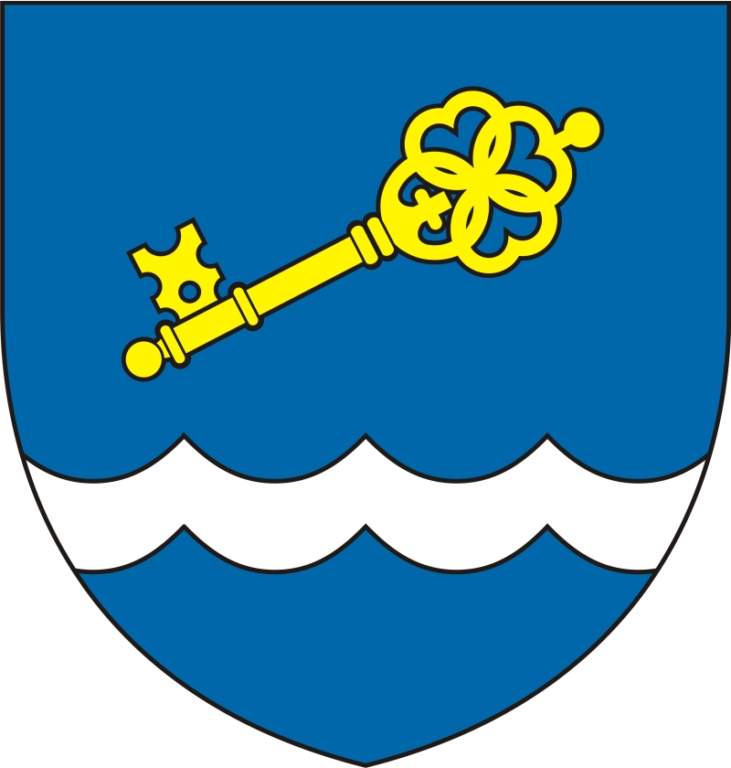 Znak města Suchdol nad Lužnicí